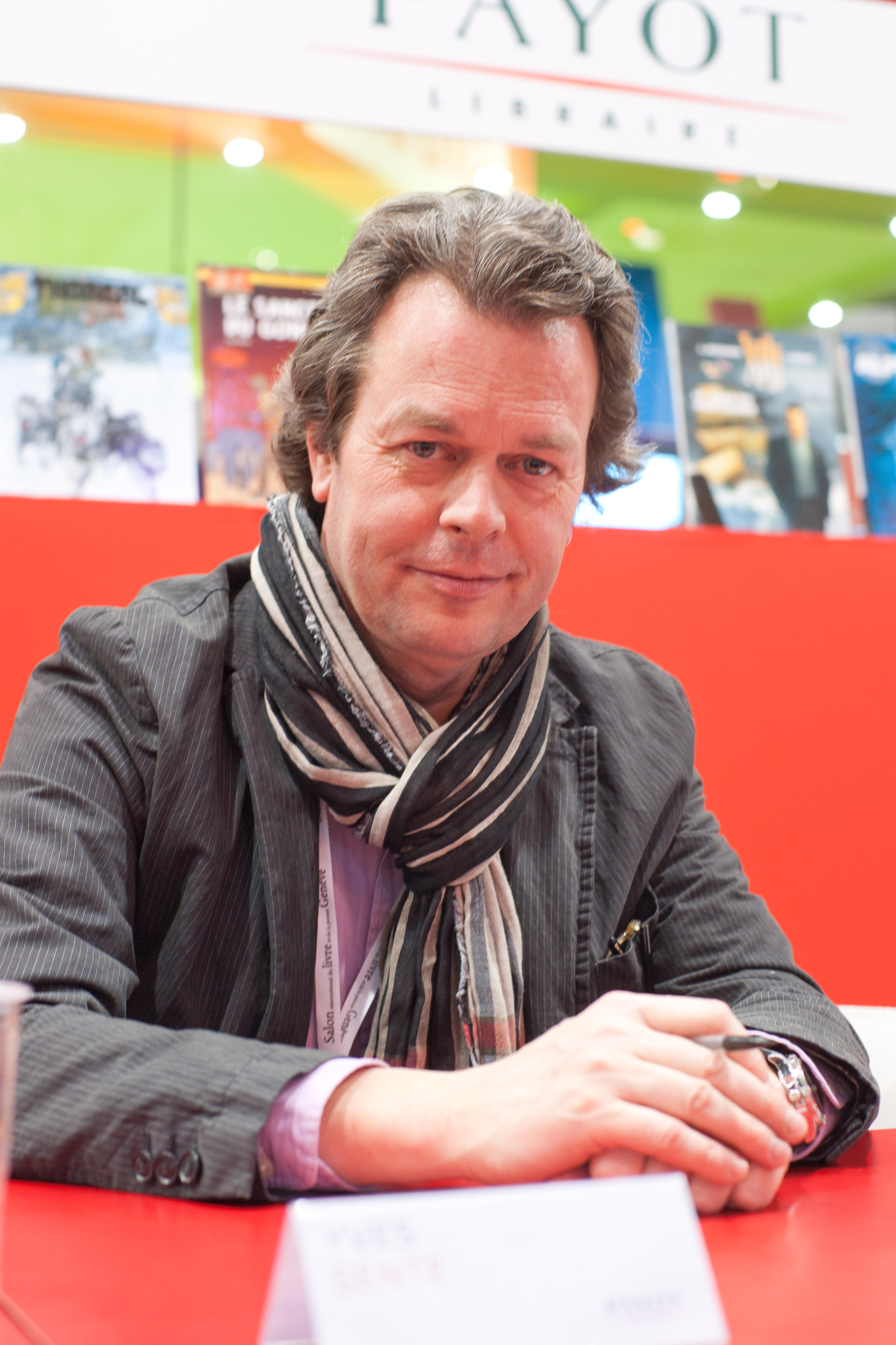 Yves Sente - salon du livre Genève 2012